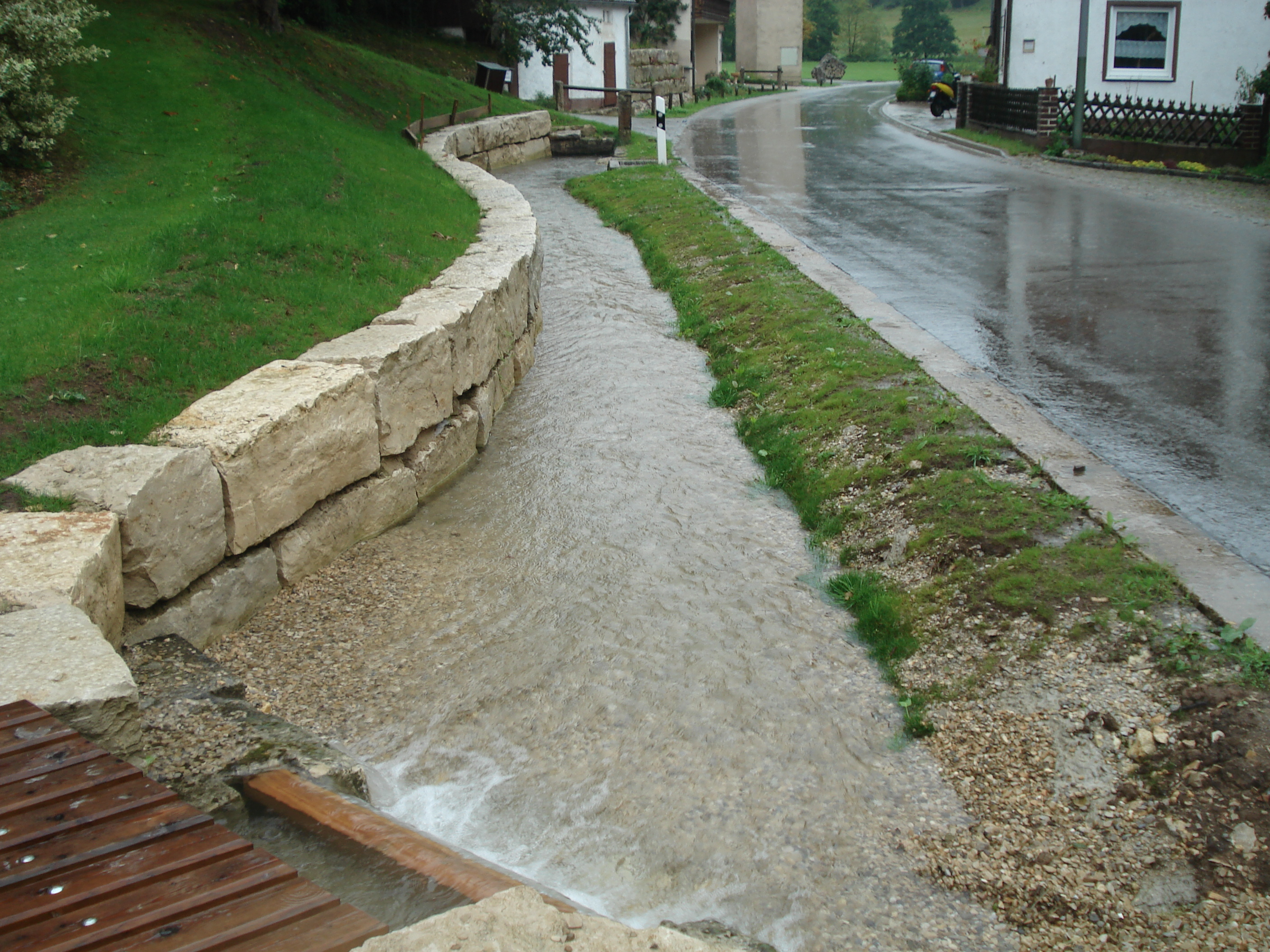 Der Abfluss der Karstquelle in Unterbürg bei Dietfurt a.d.Altmühl